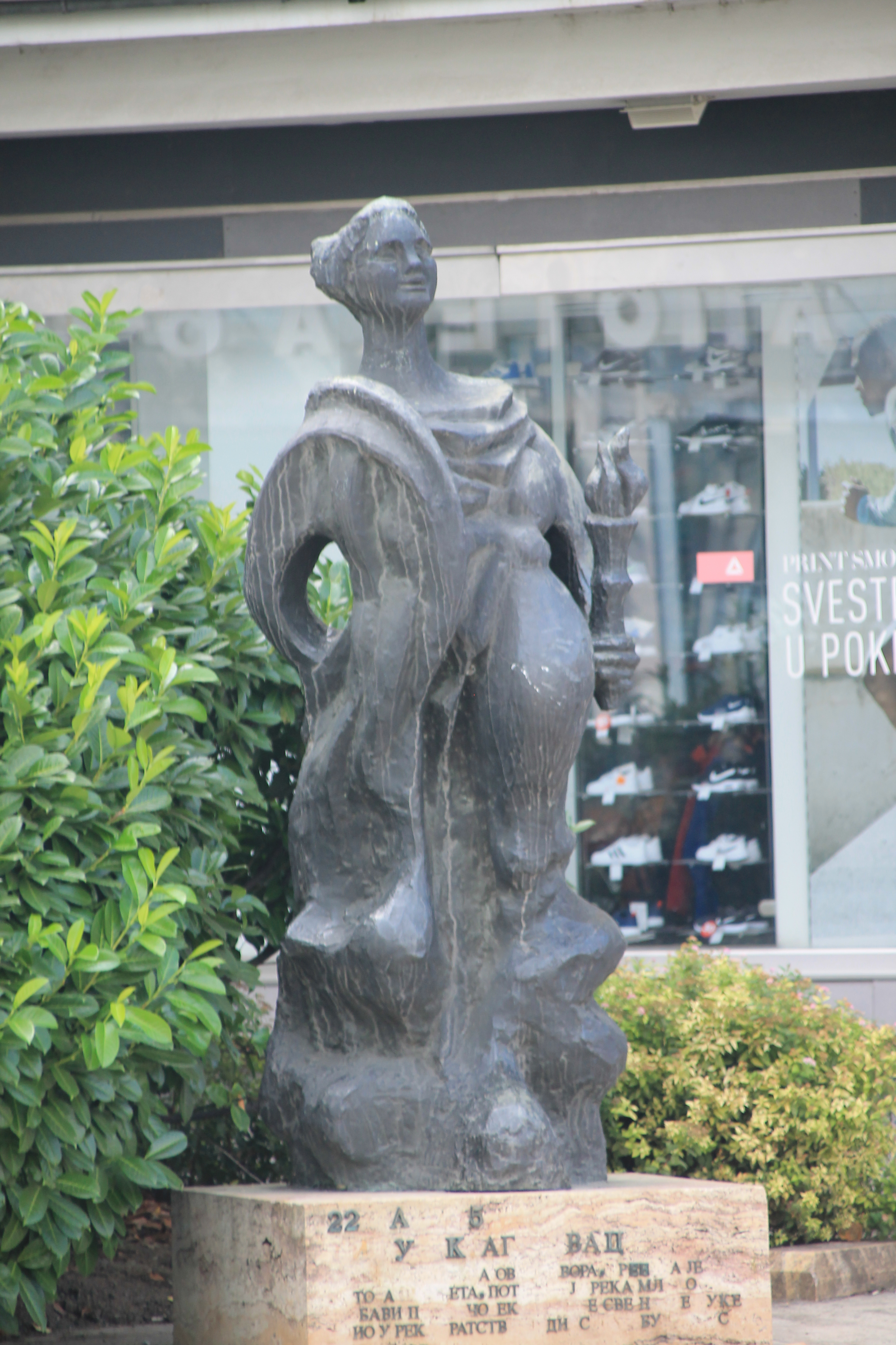 Buildings in Kragujevac